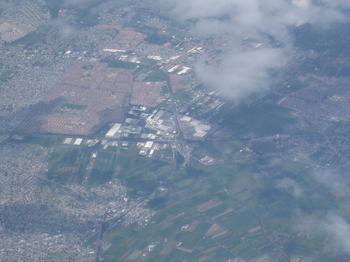 ixtapaluca